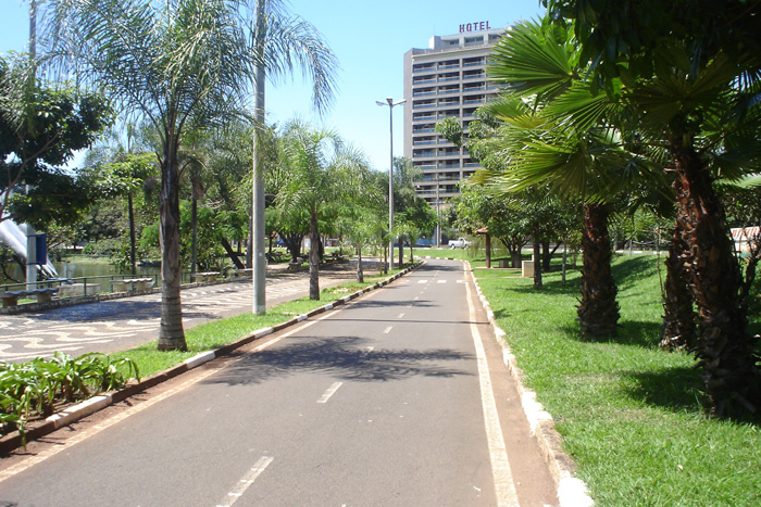 Rua em Araras - SP